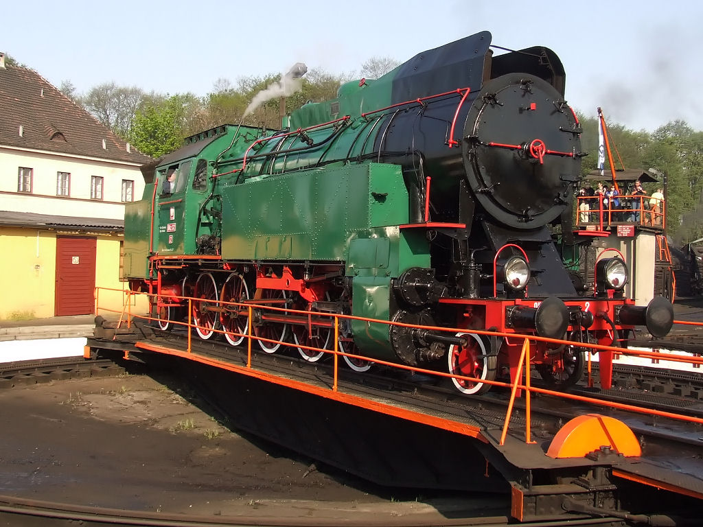 Parowóz OKz32-2 na obrotnicy w Wolsztynie.